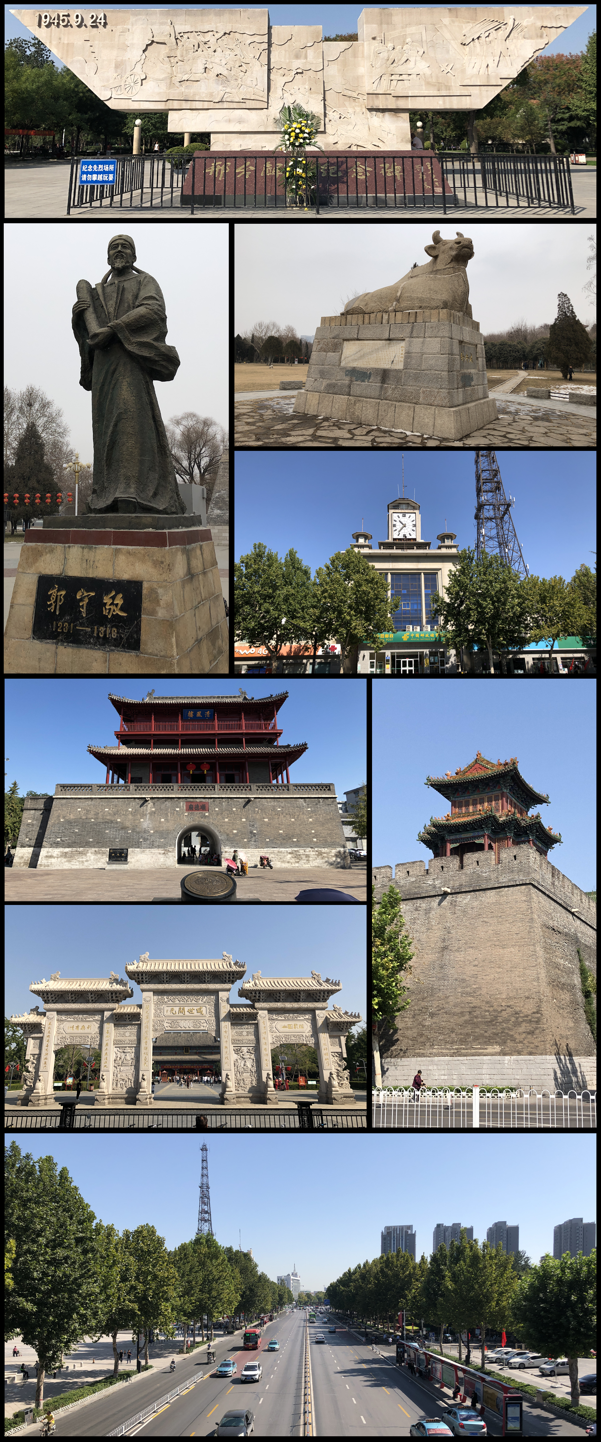 中文（中国大陆）: 邢台风光(顺时针方向)：邢台解放纪念碑、卧牛雕塑、电报大楼、邢台古城墙和火神庙、中兴西大街、大开元寺、清风楼、郭守敬雕像。